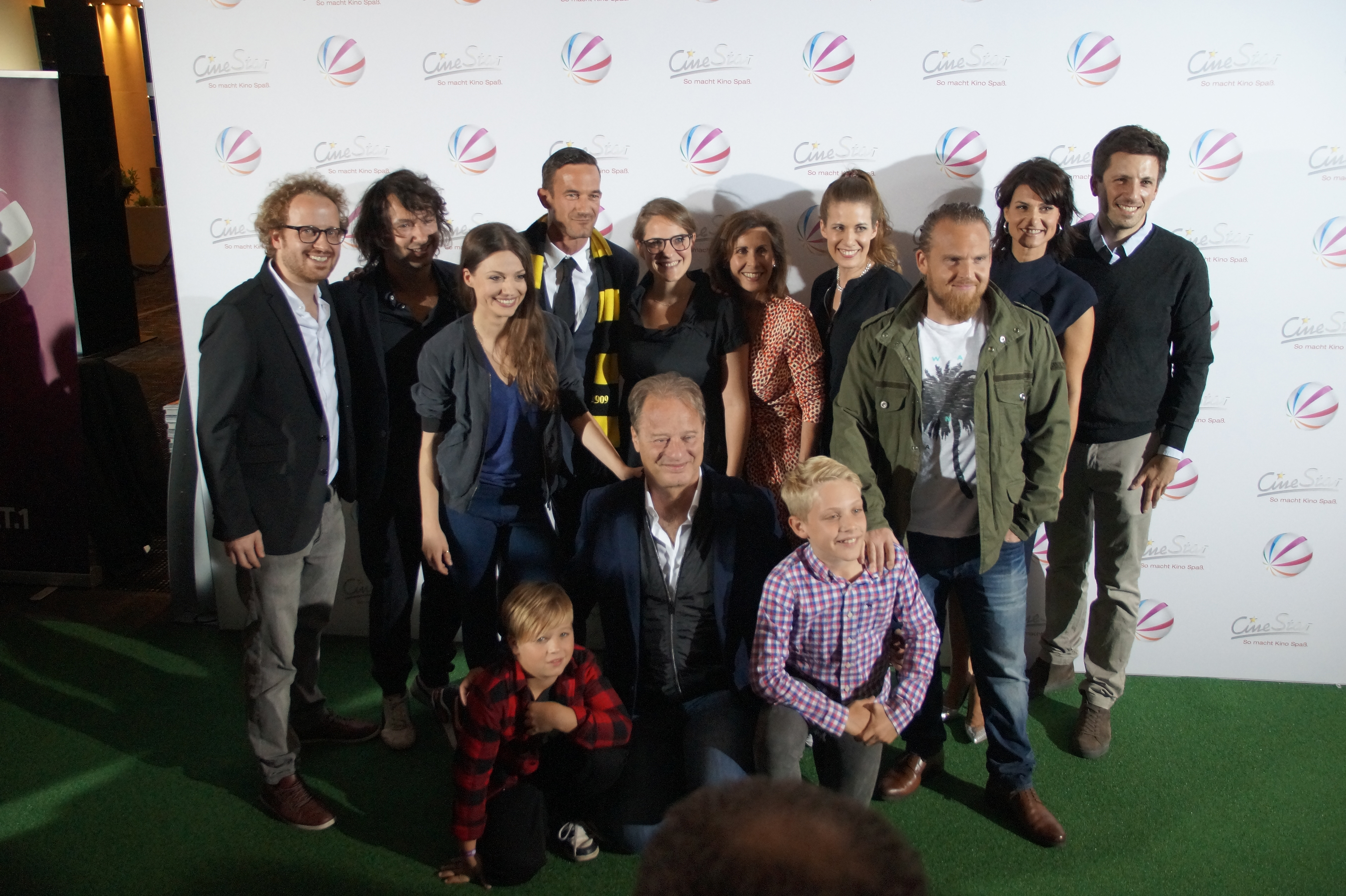 Benedikt Böllhoff, Regisseur Franz Henman, Julia Hartmann, Sönke Möhring, Annette Schönwälder, Birgit Brandes, Yvonne Weber, Axel Stein, Max Frauenknecht, Tom Gerhardt, Jonas Oeßel und Jamie-Dean Schmelzer bei der Premiere des Sat.1 Filmes "Volltreffer", am 29.9.16, in Dortmund.